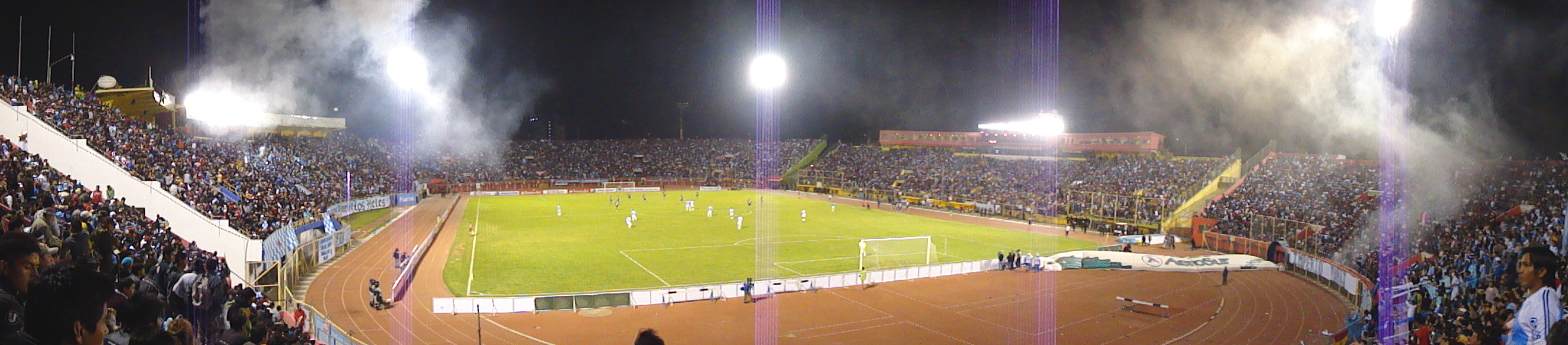 Hinchada del Club Aurora en la Copa Sudamericana 2011 en el Estadio Félix Capriles donde se observa un lleno completo.